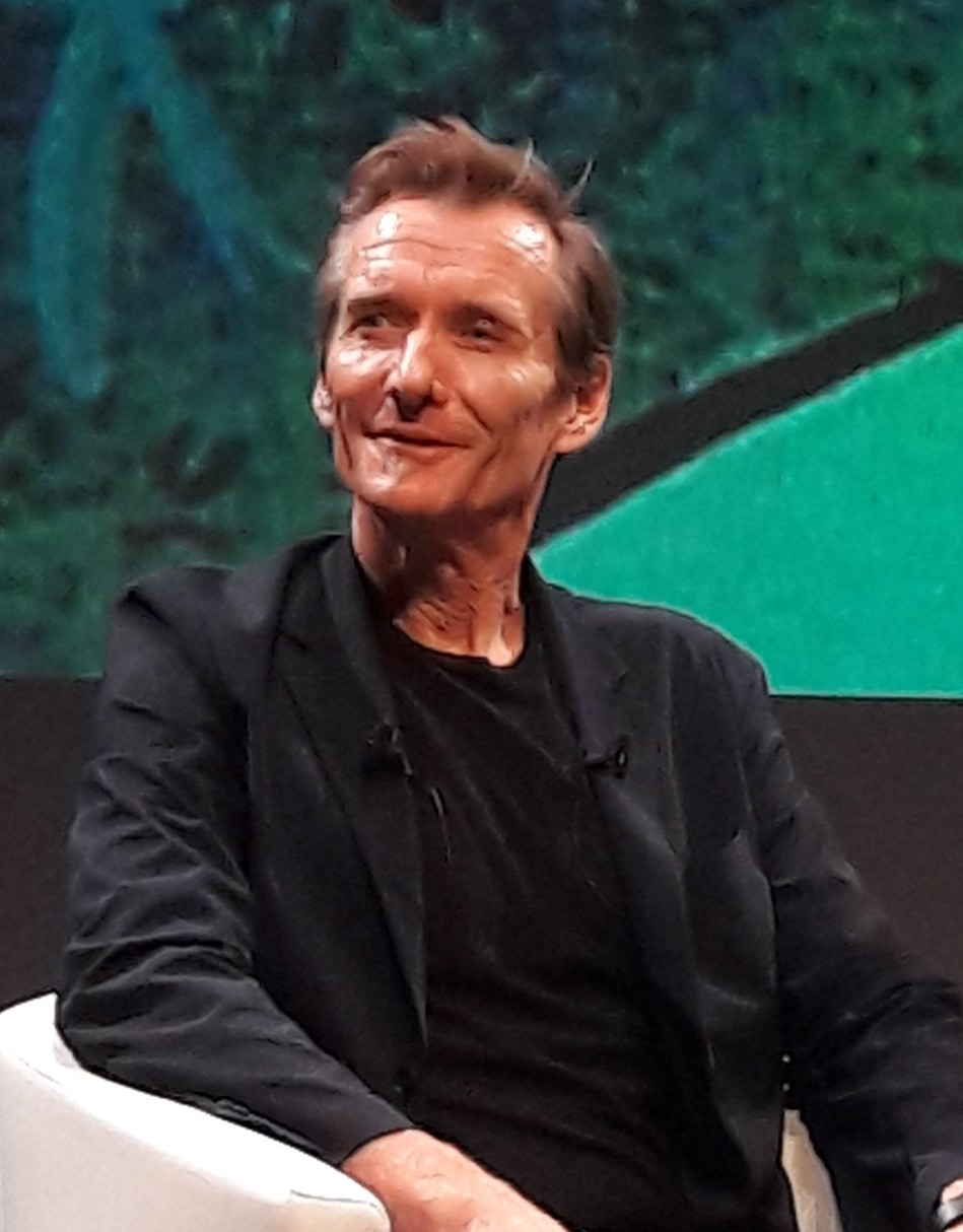 Vincent Waller au festival international d'animation d'Annecy 2019.